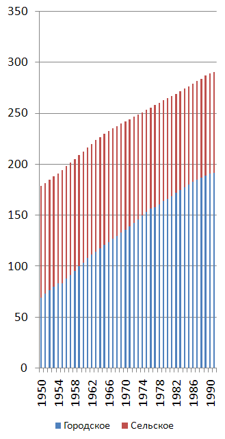 Численность населения СССР (график), млн. человек.